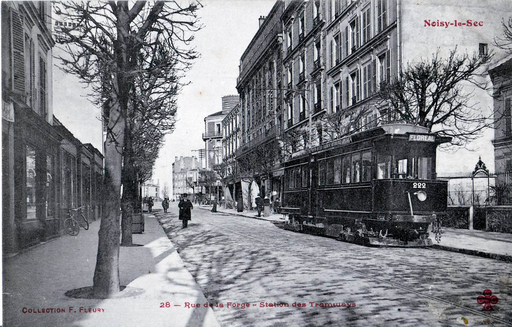 Carte postale ancienne éditée par Fleury N° 28Noisy-le-Sec : Rue de la Forge - Station des Tramways